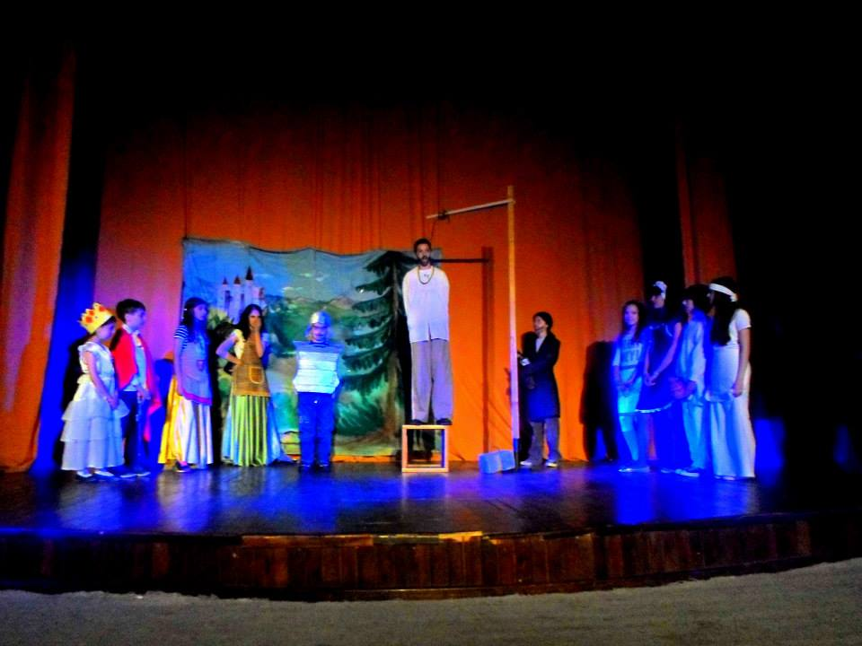 Српски (ћирилица): Драмски студио "Просвјета", Вишеград